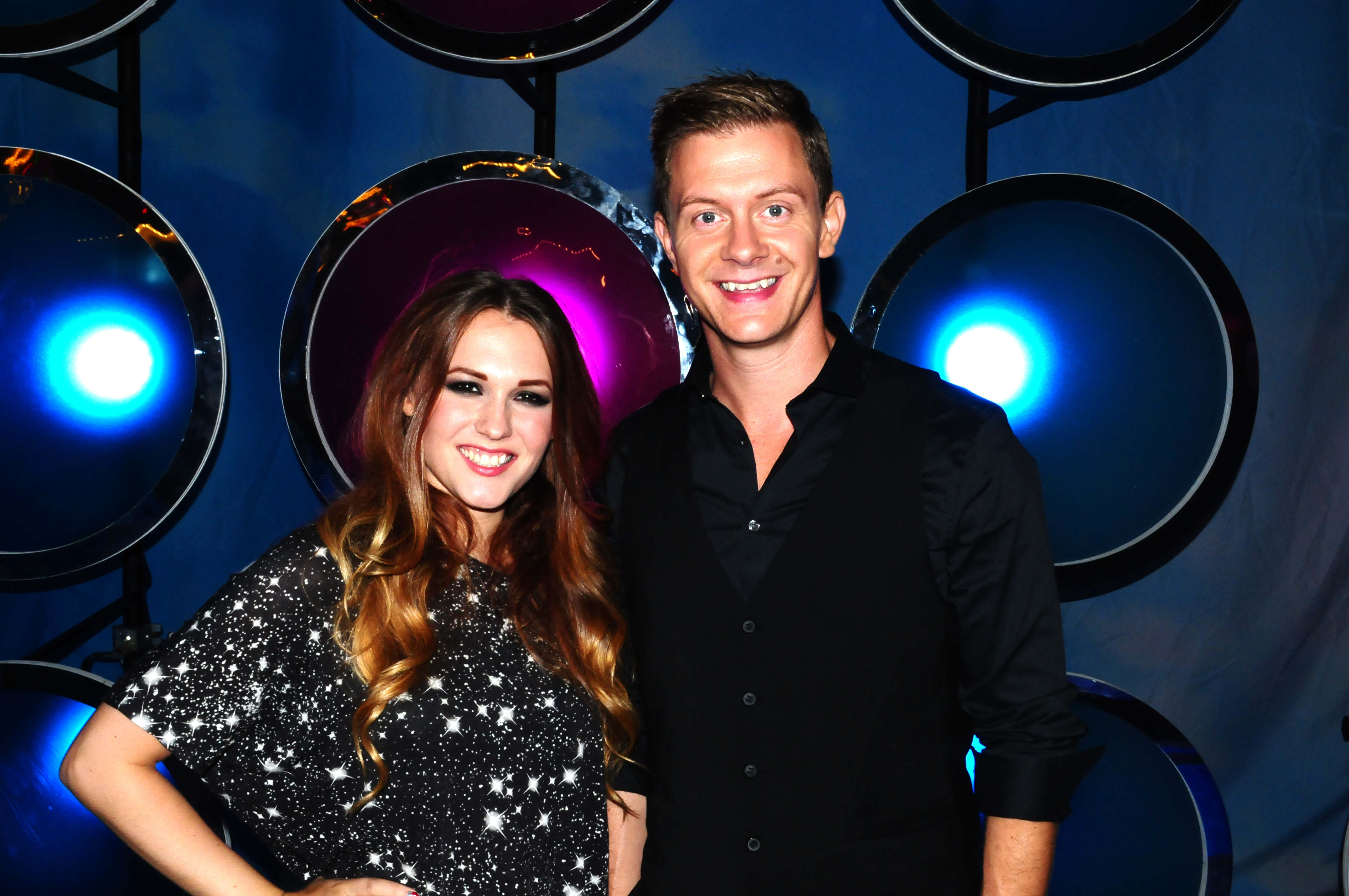 Tobbe Blom på Sommarkrysset 2014